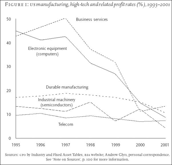 Американская (США) норма прибыли по отраслям